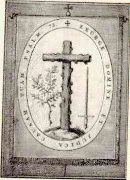 Seal of Spanish Inquisition in New Spain (1571-1820)/Escudo de la Inquisición Española en Nueva España (1571-1820)